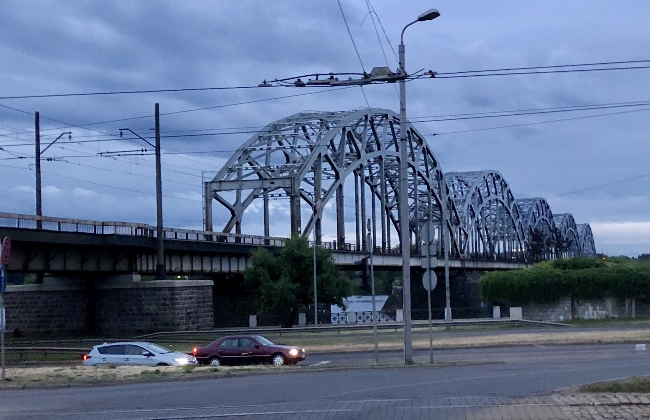 Eisenbahnbrücke in Riga